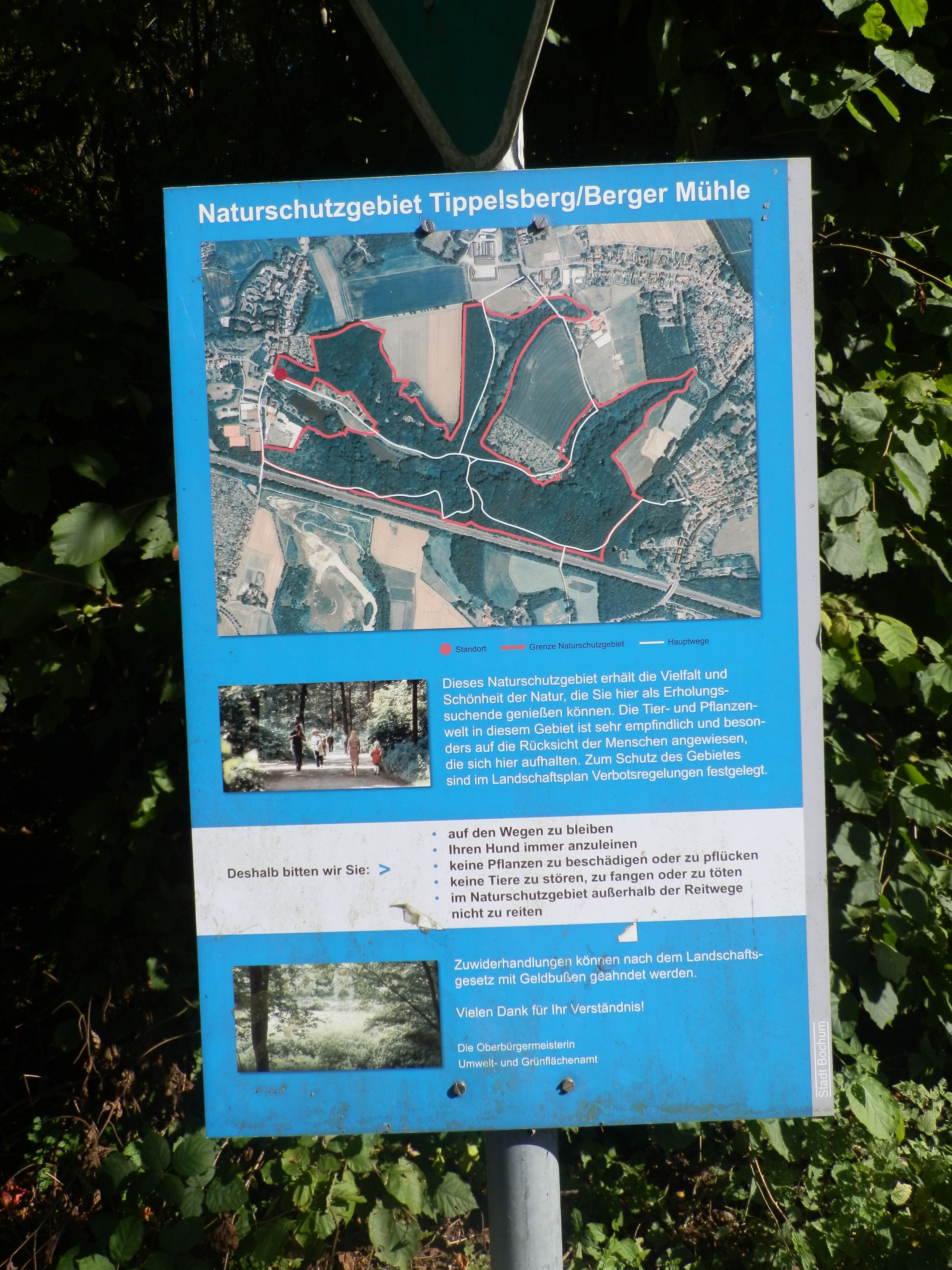 Das Informationsschild mit Karte beim Eingang des Naturschutzgebiet Tippelsberg/Berger Mühle (Bochum)